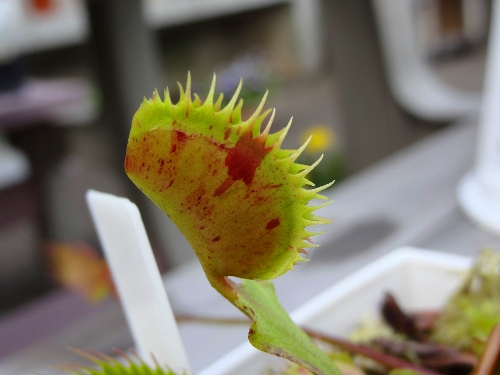 ハエトリソウ Dioneae 'spotty'